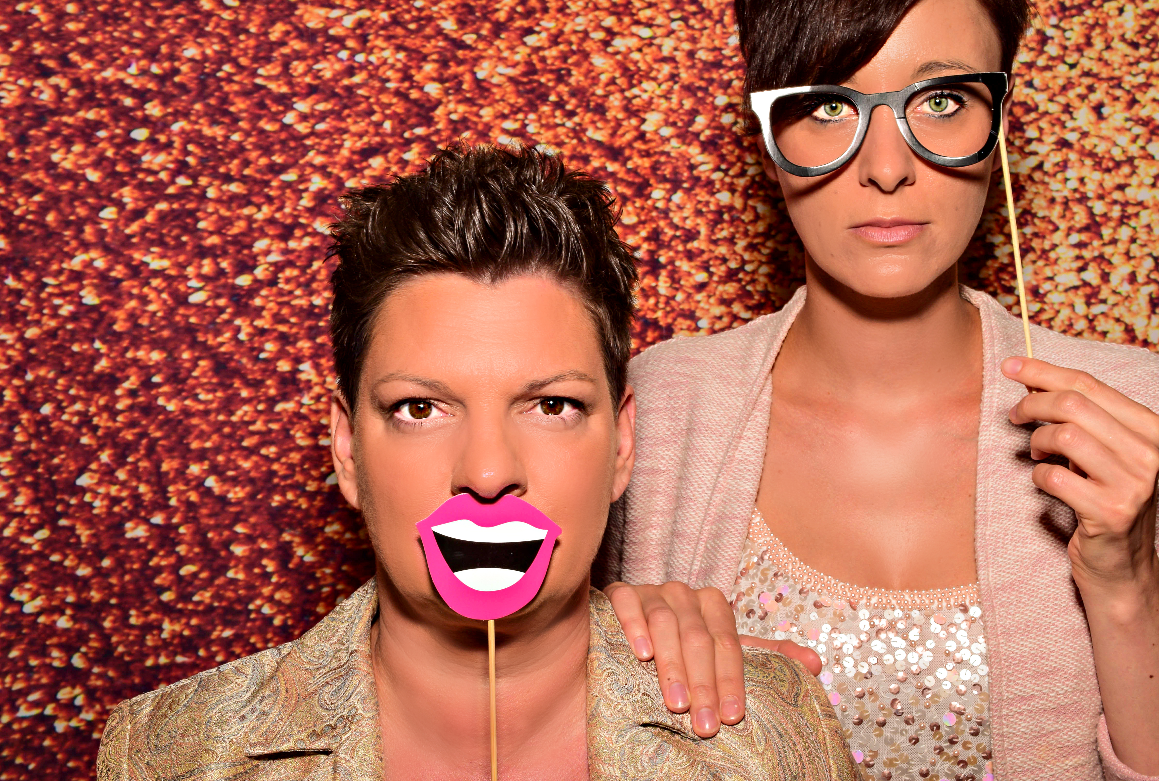 Die Musikkabarettistinnen Vanessa Maurischat und Annie Heger sind die "Heger & Maurischat GbR". Sie sind mit ihrem Programm "Eine geht noch!" auf Tour.